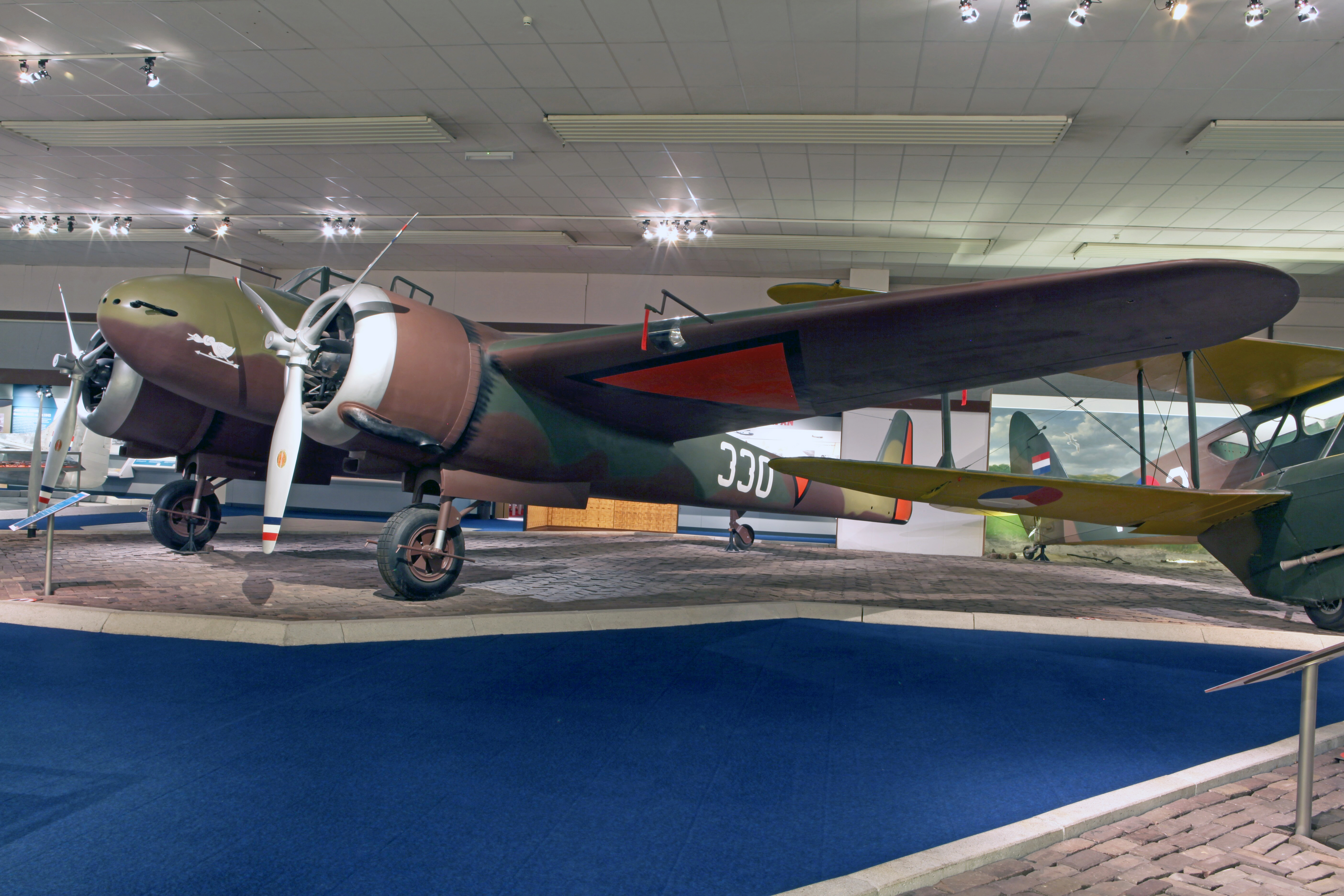 Fokker G-1A